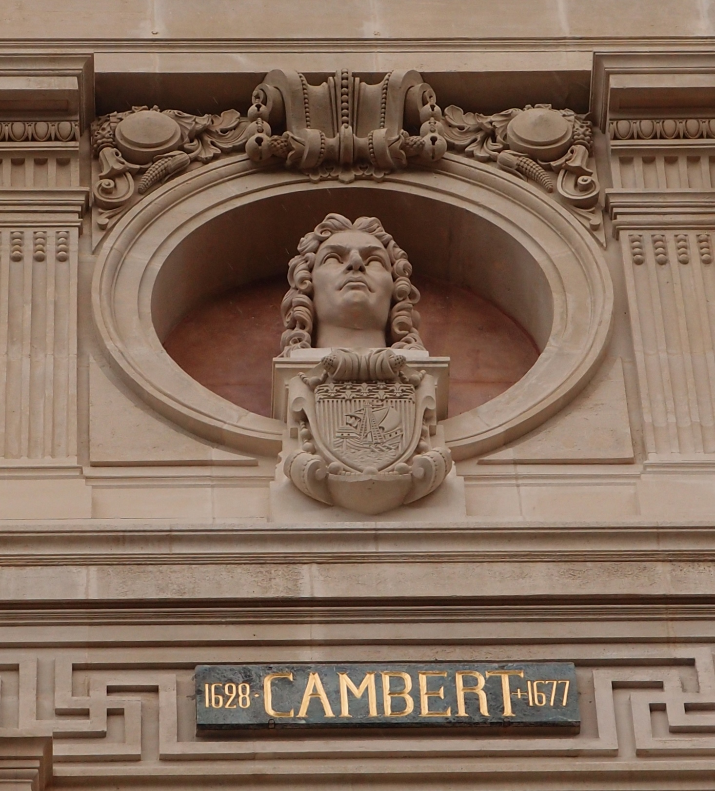 Büste des Organisten und Komponisten Robert Cambert (1628-1677) an der Fassade der Opéra Garnier in Paris.